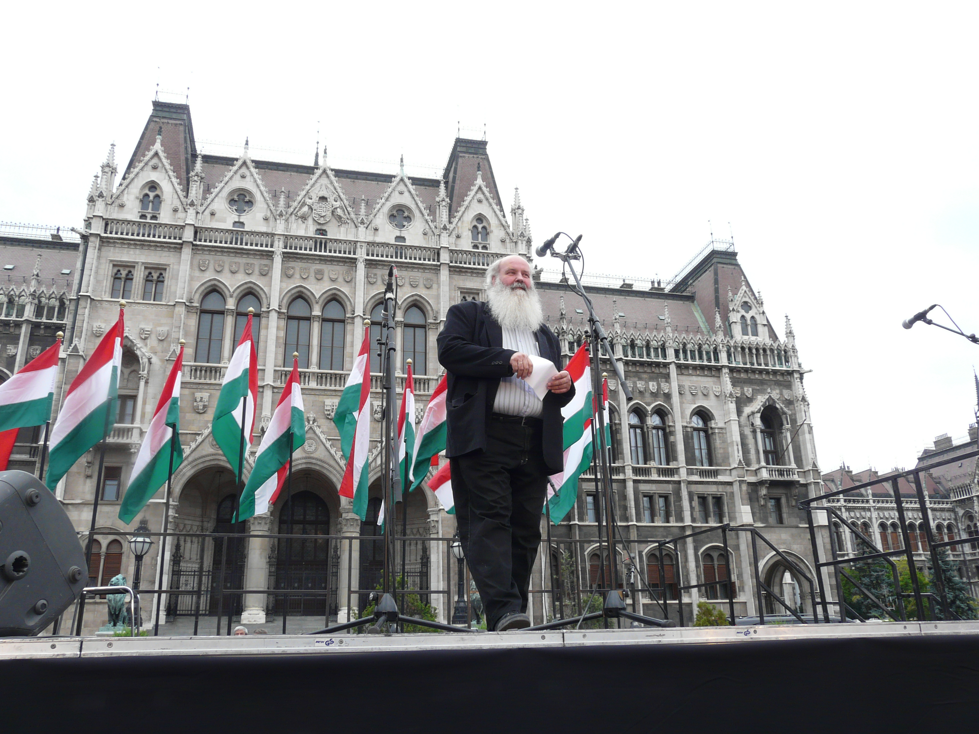 2008 szeptember 20-án Gyurcsány Ferenc miniszterelnök kezdeményezésére gyűlést tartott a Kossuth téren a Magyar Demokratikus Charta Iványi Gábor részvételével. A felvétel megjelent Creative Commons alatt a Metapolisz DVD sorozatban.